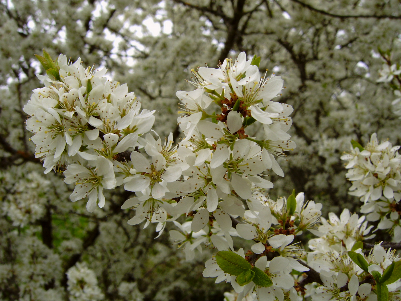 Schlehenblüte (Prunus spinosa) 2009 auf der Schwäbischen Alb